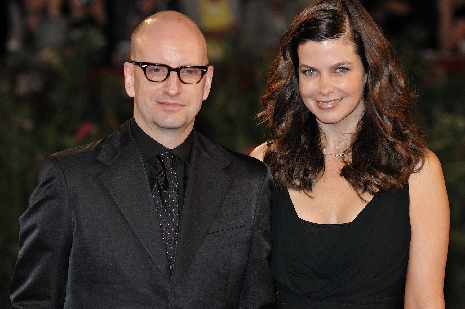 66ème Festival du Cinéma de Venise (Mostra), 6ème jour (07/09/2009) Tapis rouge avec Matt Damon (et sa femme) avec Steven Soderbergh pour le film : The Informant